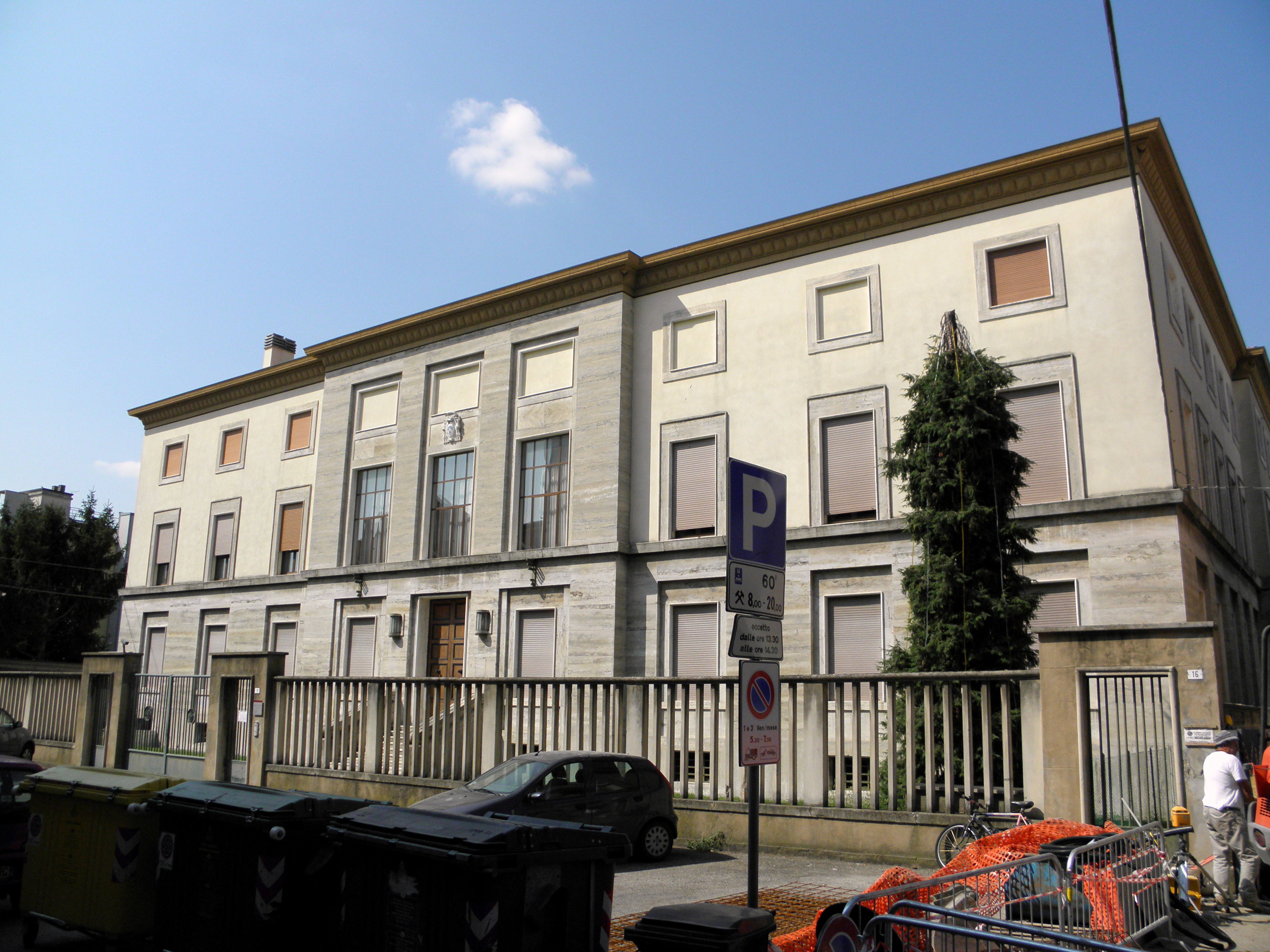 Rovigo, Via Monsignor Sichirollo: l'Episcopio, ovvero il palazzo sede cittadina della Diocesi di Adria-Rovigo.